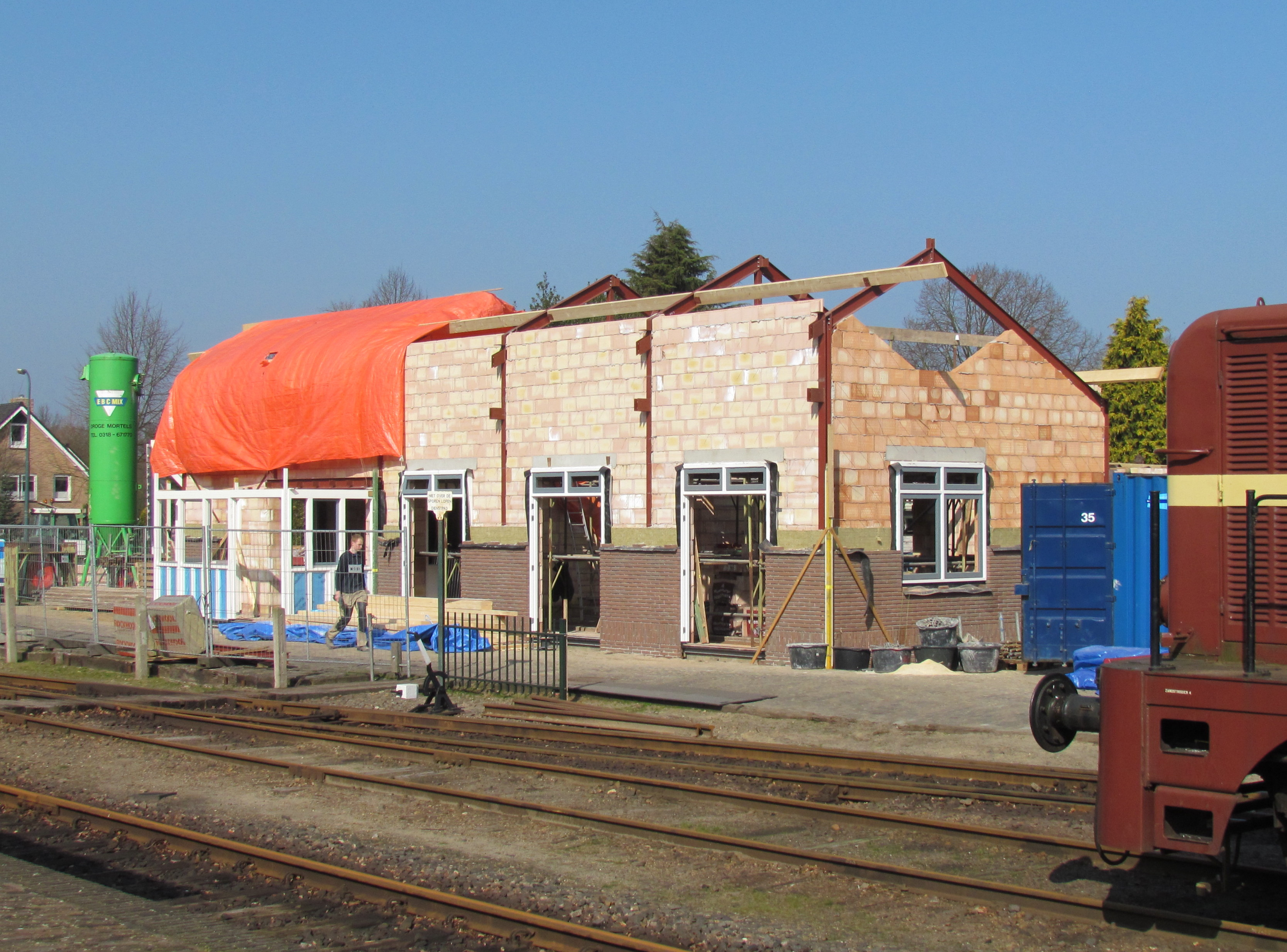 Op station Beekbergen (NL) is een nieuw stationsgebouw in aanbouw